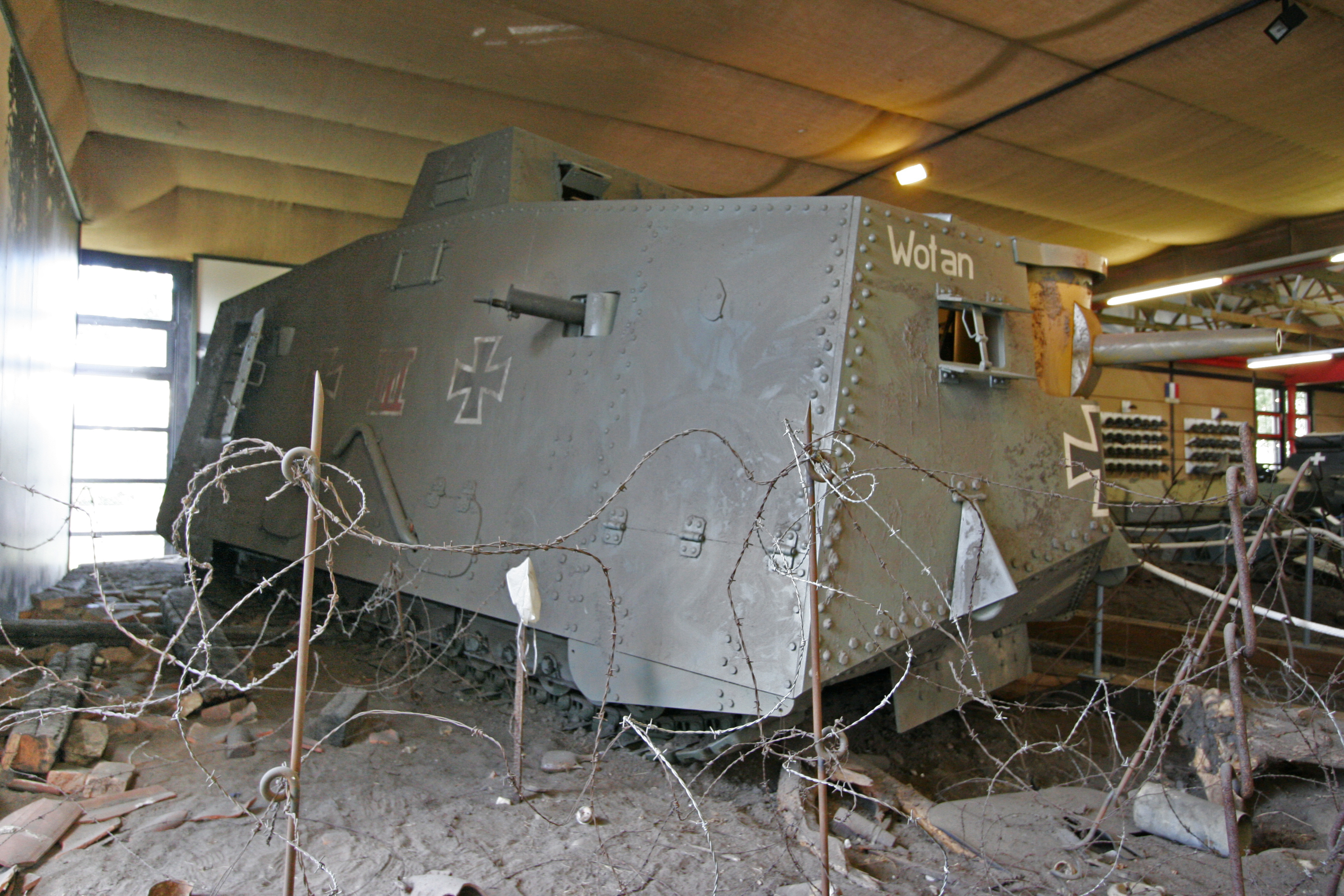 Sturmpanzerwagen A7V Replik on display at the Deutsches Panzermuseum Munster , Germany.